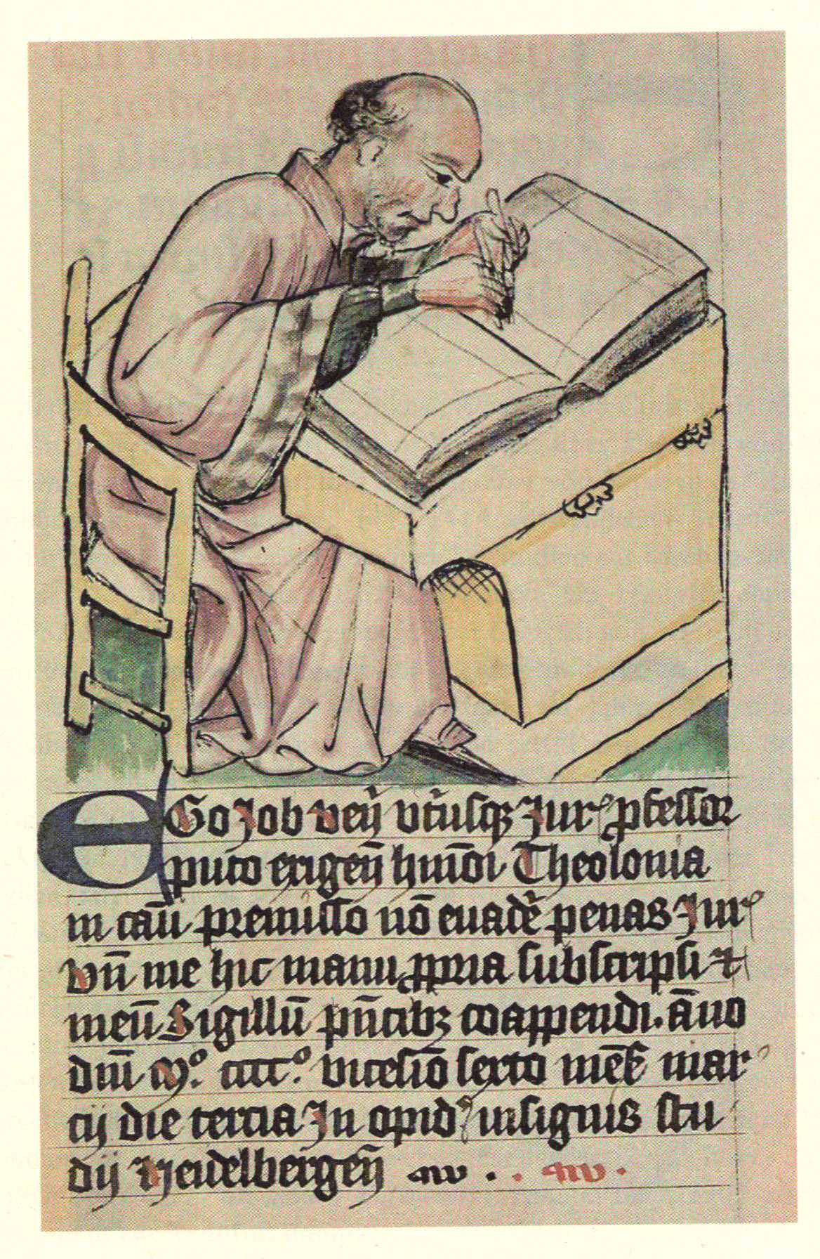 Job Vener als Gutachter 1426, München, Geheimes Hausarchiv, Hs 12, Bl. 8